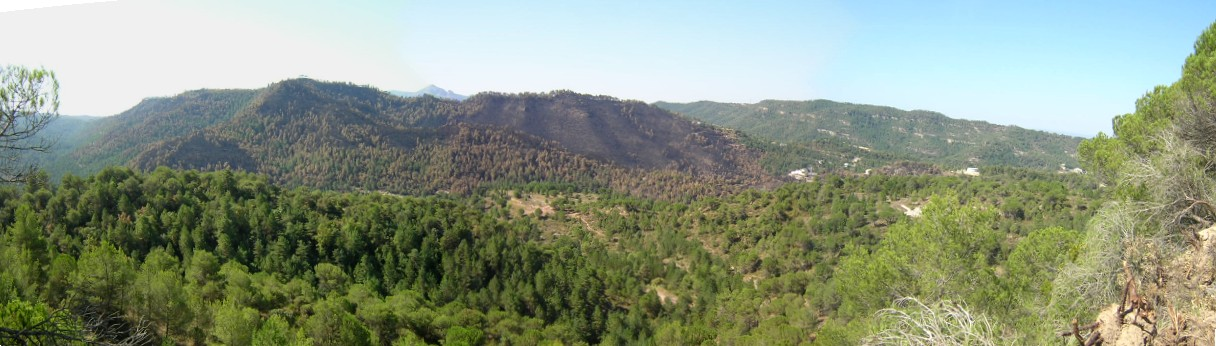 Trullars des del nord-oes (Monistrol de Calders, Moianès)